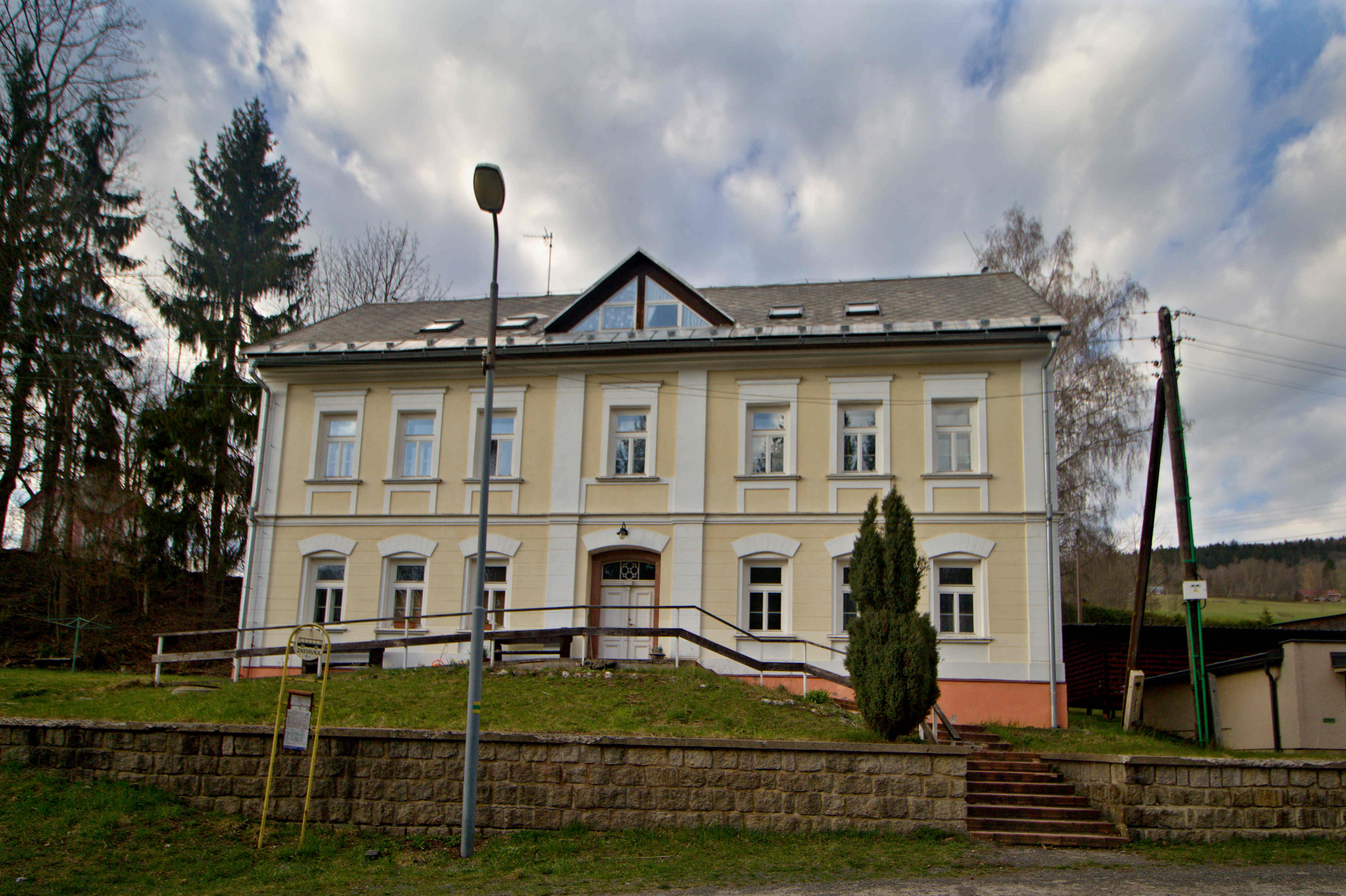 Mrklov